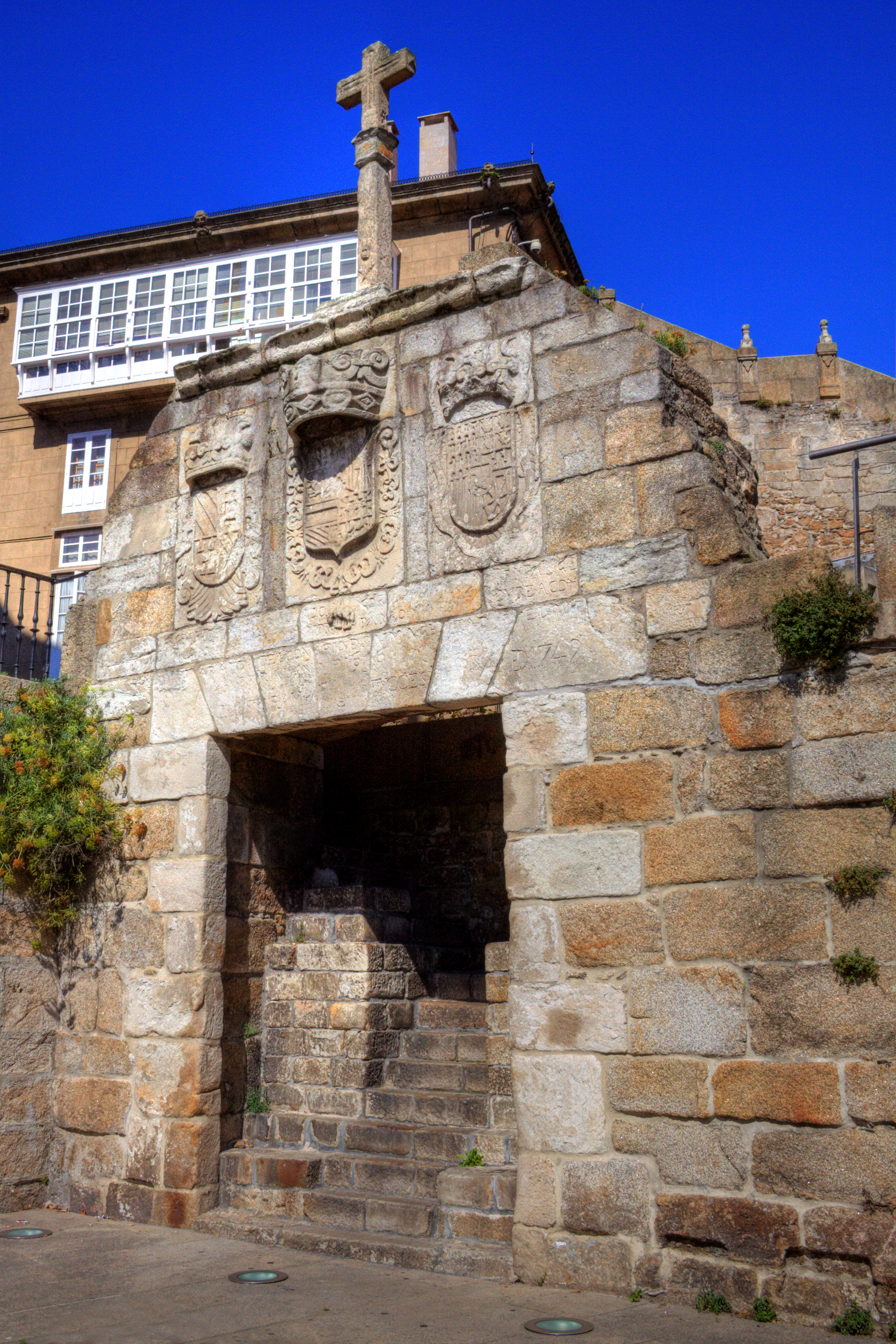 A Coruña, murallas del Parrote